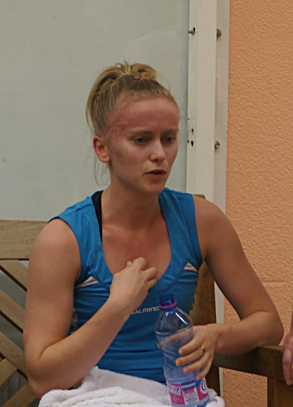 Emily Whitlock, Monte-Carlo squash classic 2015